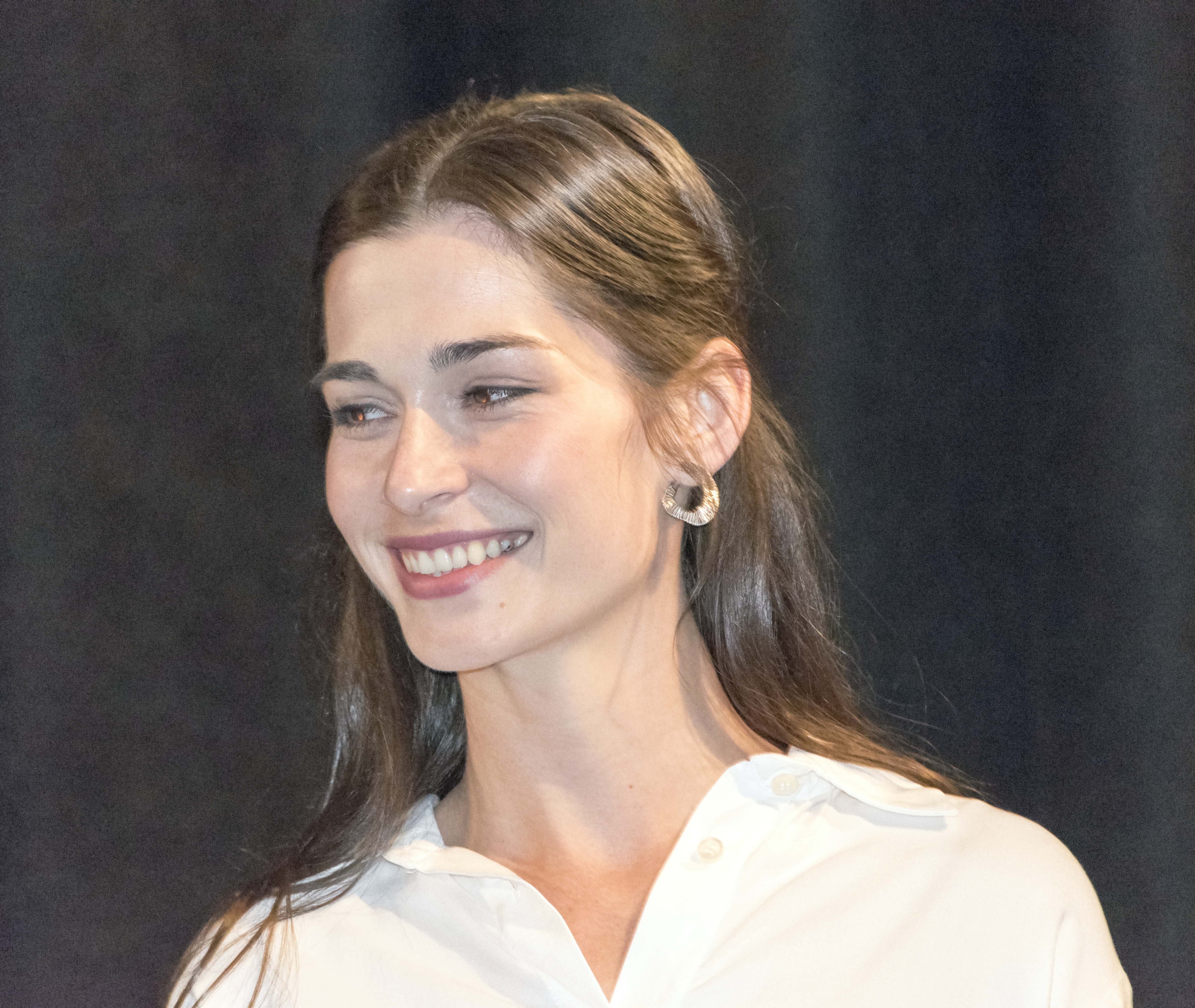 Fotky z novinářské projekce 18. 4. 2018 Autor: Blanka Borová (Karolína Černá) pro Kritiky.cz